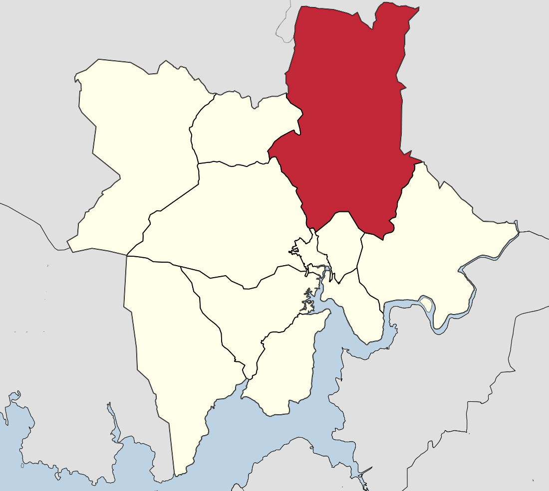 Parroquia de San Orente de Entines en Outes